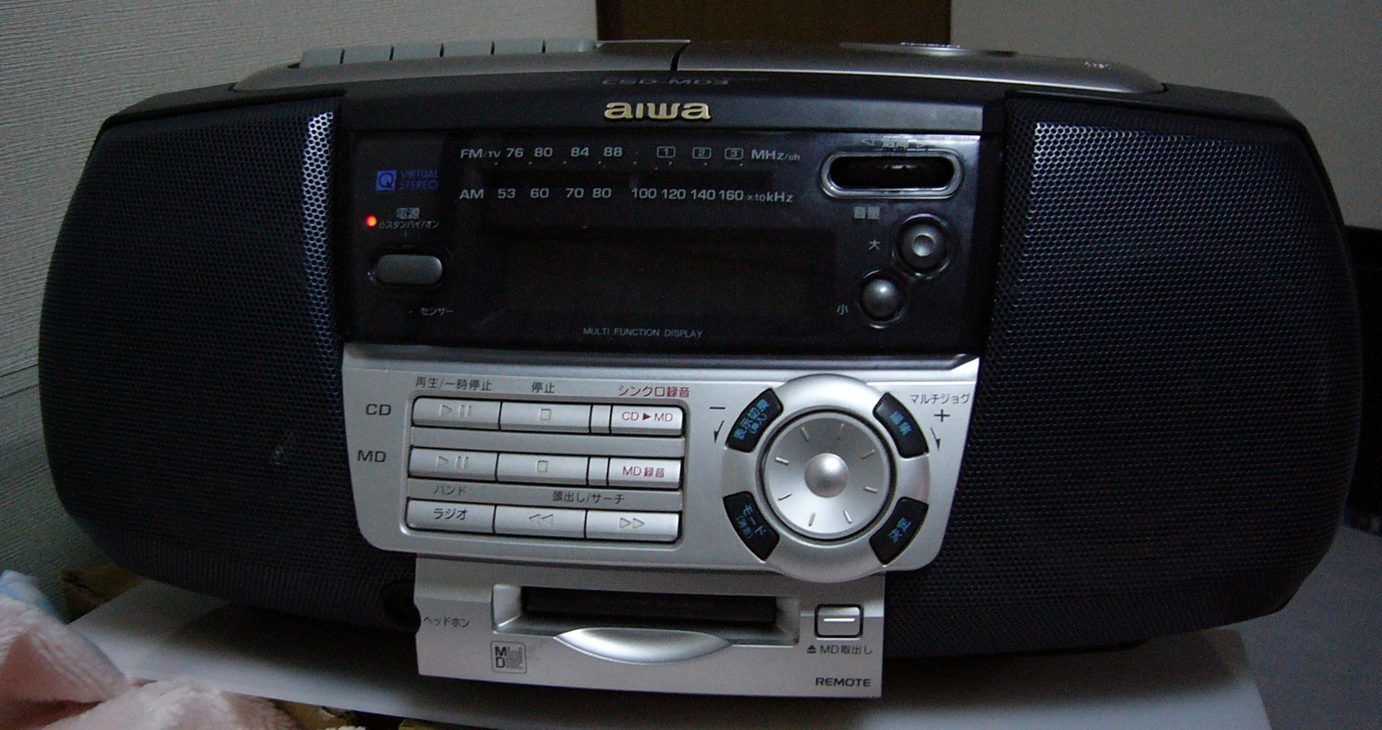 撮影者本人の所有しているラジカセです。